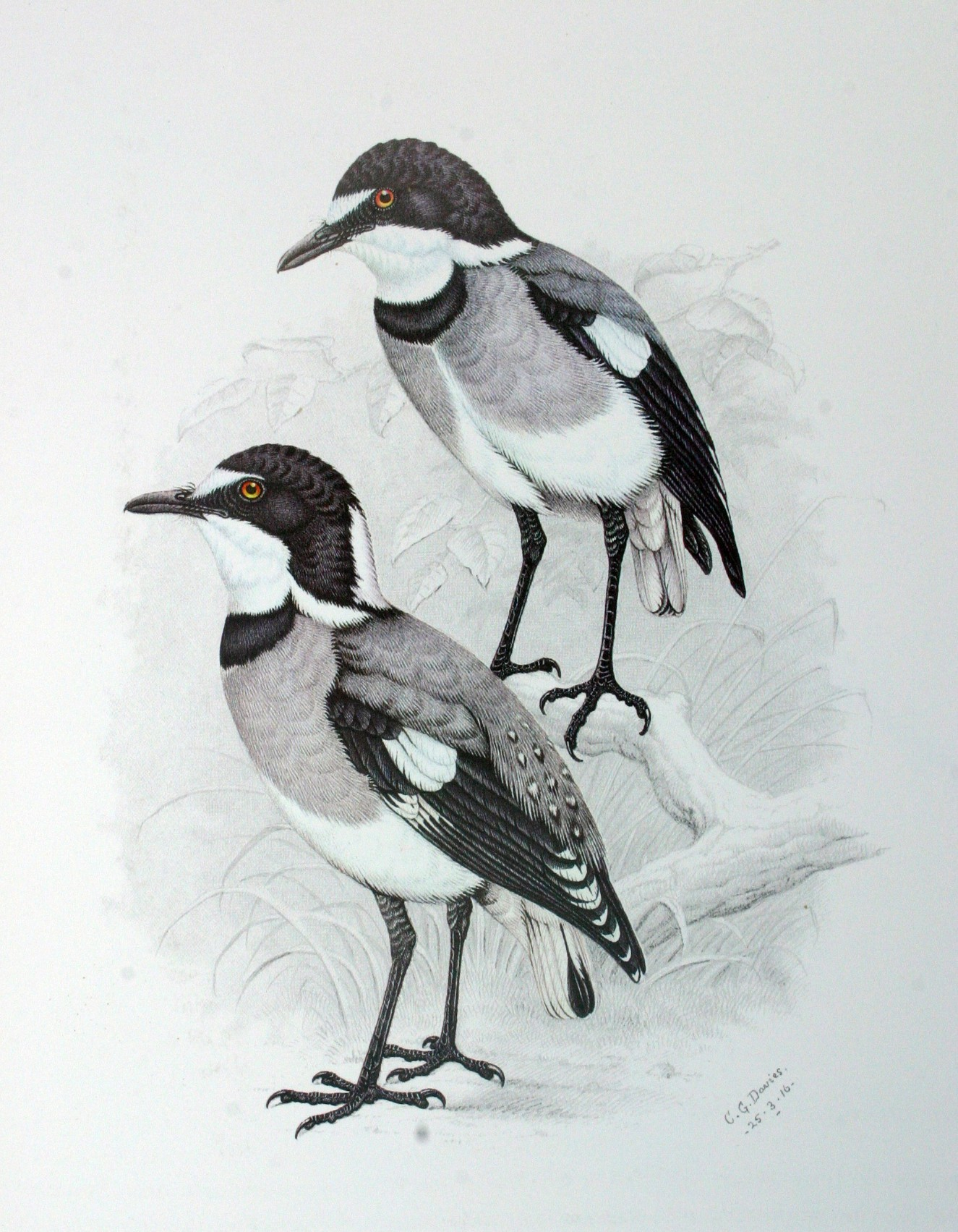 Whitetailed Shrike (Lanioturdus torquatus) (adult male and female)